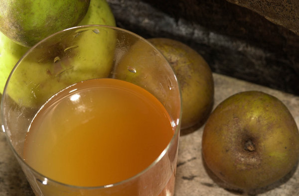 Sagardo basoa eta sagarrak.